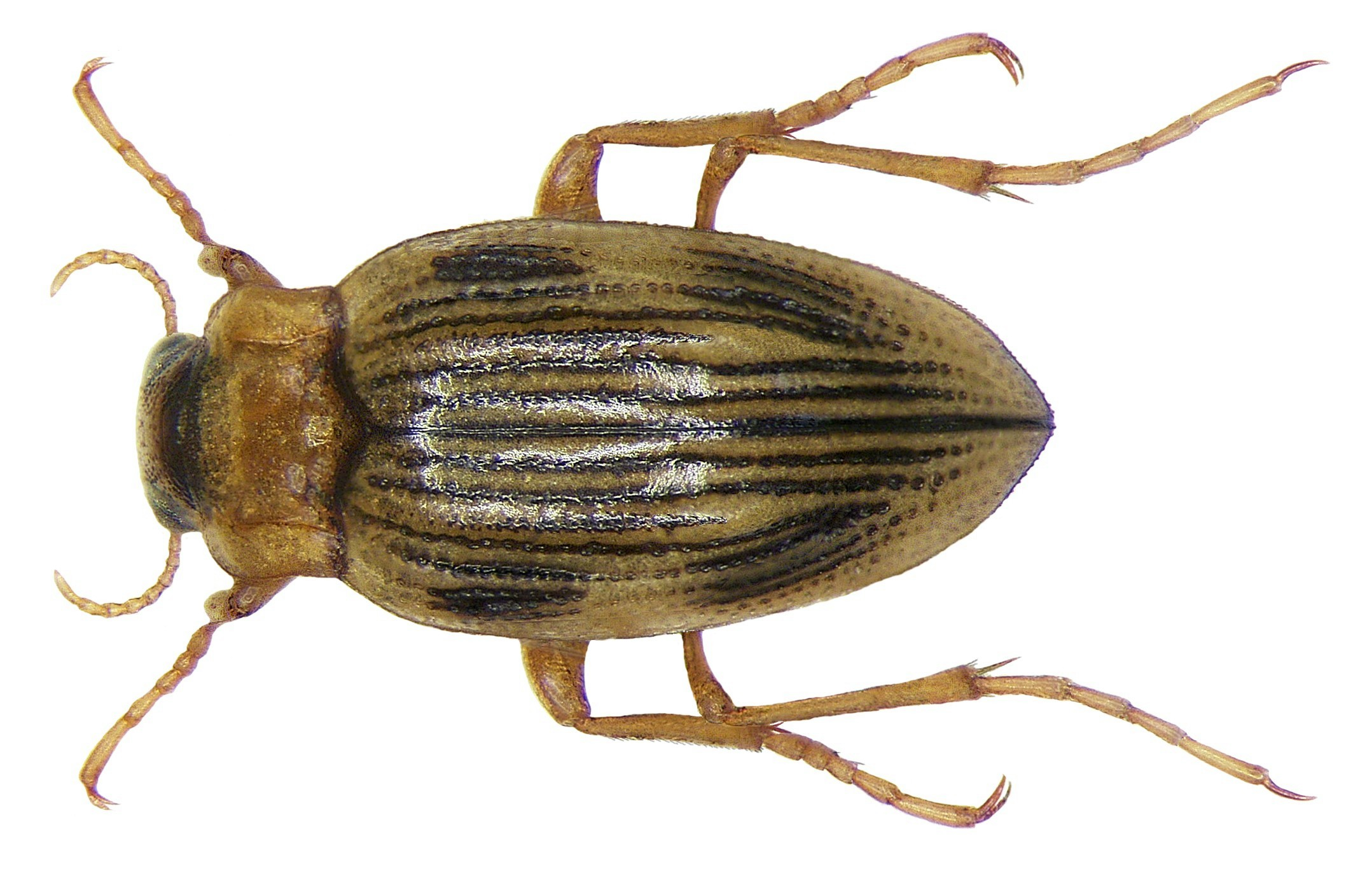 Brychius elevatus (Panzer, 1794) Familie: Haliplidae Grösse: 3,5-4,3 mm Verbreitung: West- und Nordeuropa bis Westrußland Ökologie: in langsam fließenden Gewässern Foto: U.Schmidt, 2008